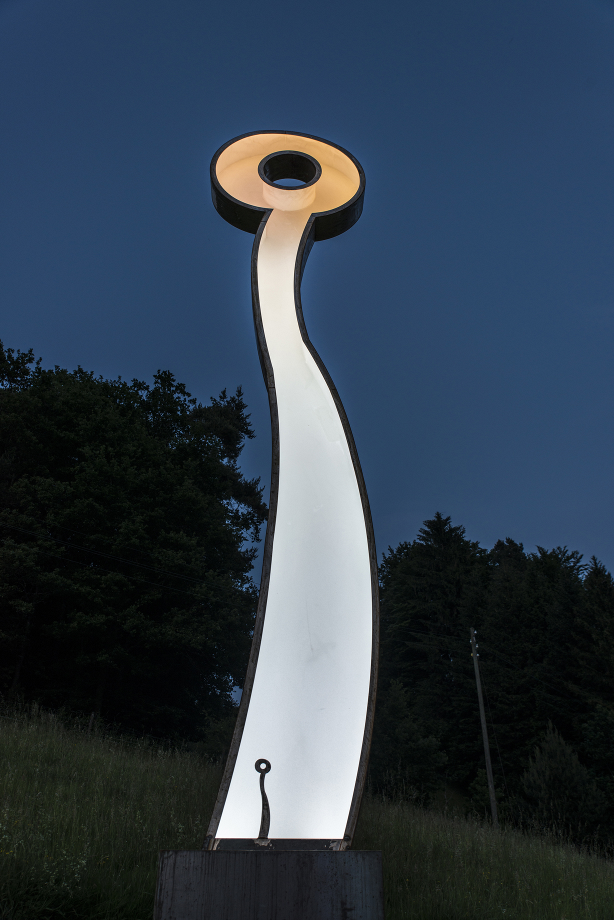 Der Leuchtwächter von Reto Bärtschi, welcher im Rahmen von Kunst am Schlossberg in Melchnau ausgestellt war.